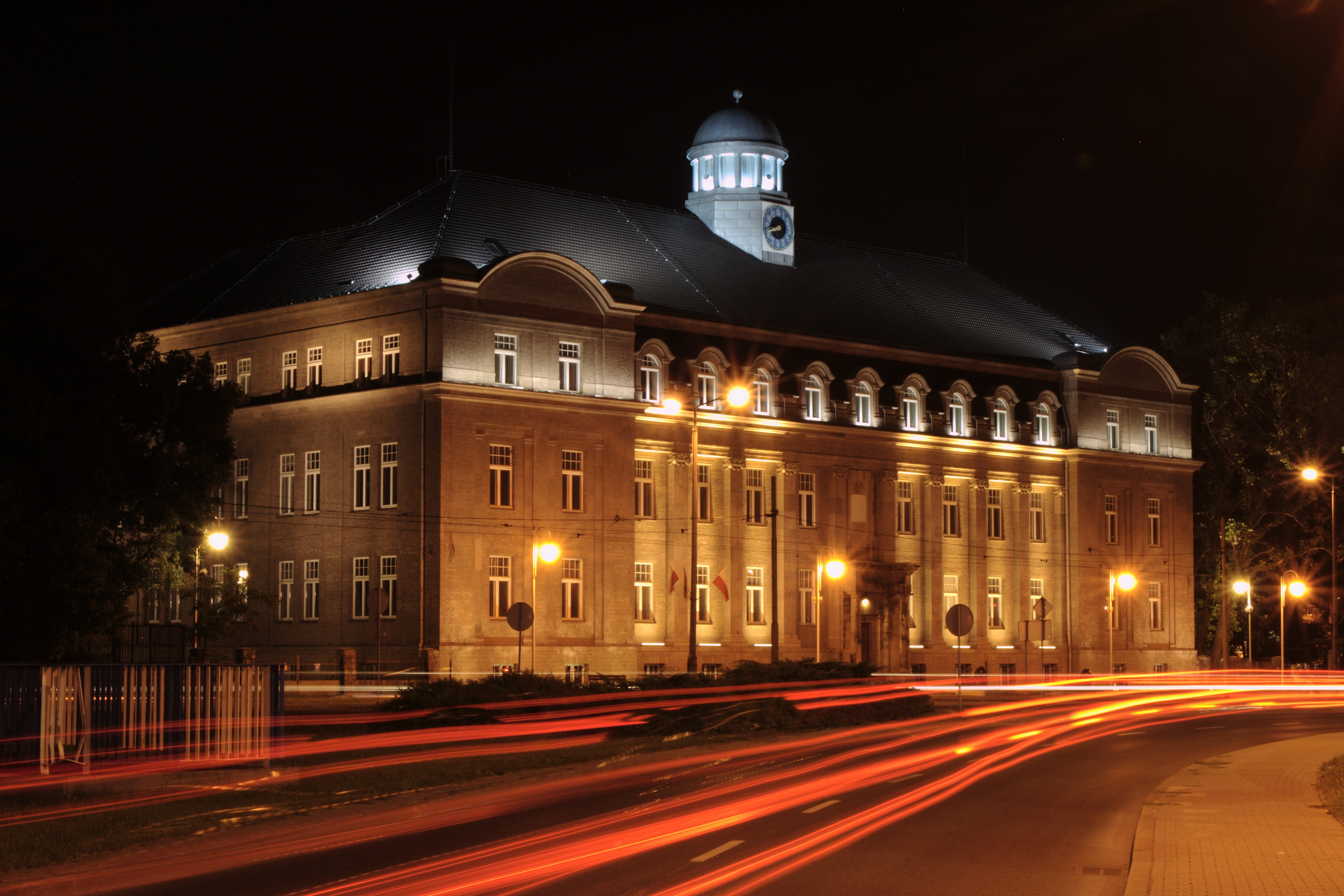 Wybudowana w 1907 roku siedziba dyrekcji Donnersmarckhutte. Po II wojnie światowej budynek mieścił dyrekcję Huty Zabrze. W 2008 roku budynek dyrekcji przejęły za długi władze Zabrza. Po remoncie stanie się ich nową siedzibą (zabytek nr A/214/07 z 8.10.2007).